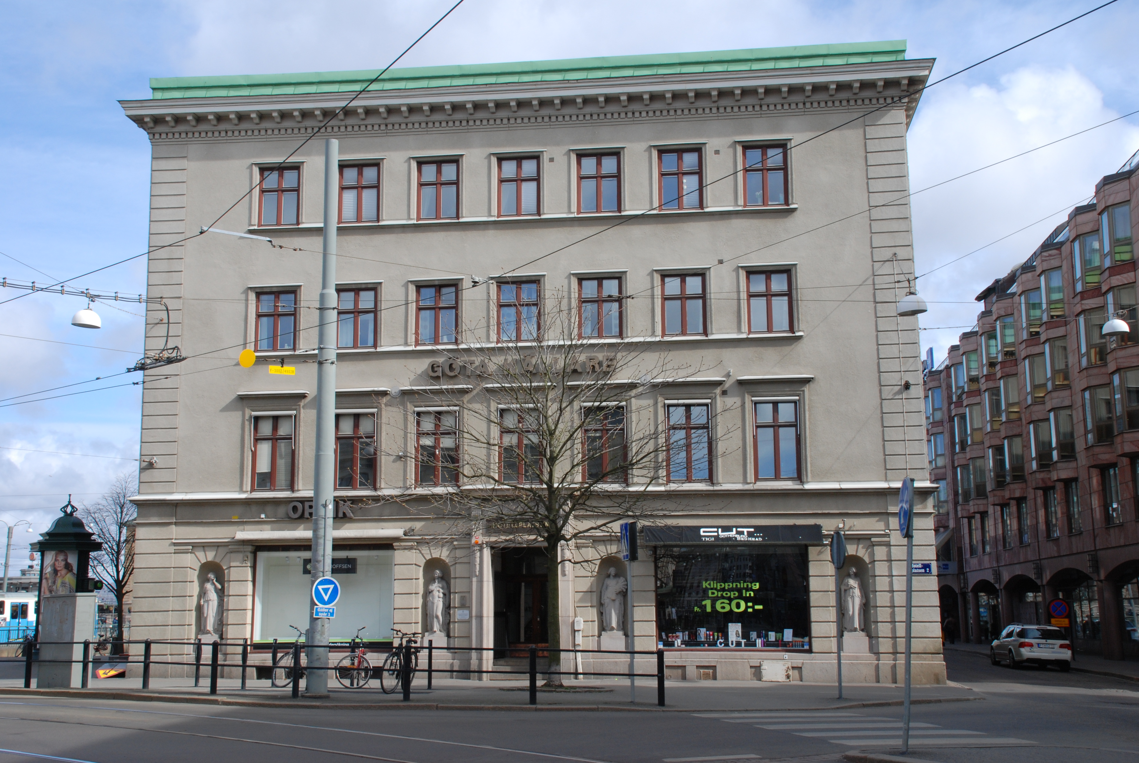 Göta Källare vid Hotellplatsen 2 i Göteborg. Byggnaden uppförd år 1810 som värdshus och hotell. Numera kontor.